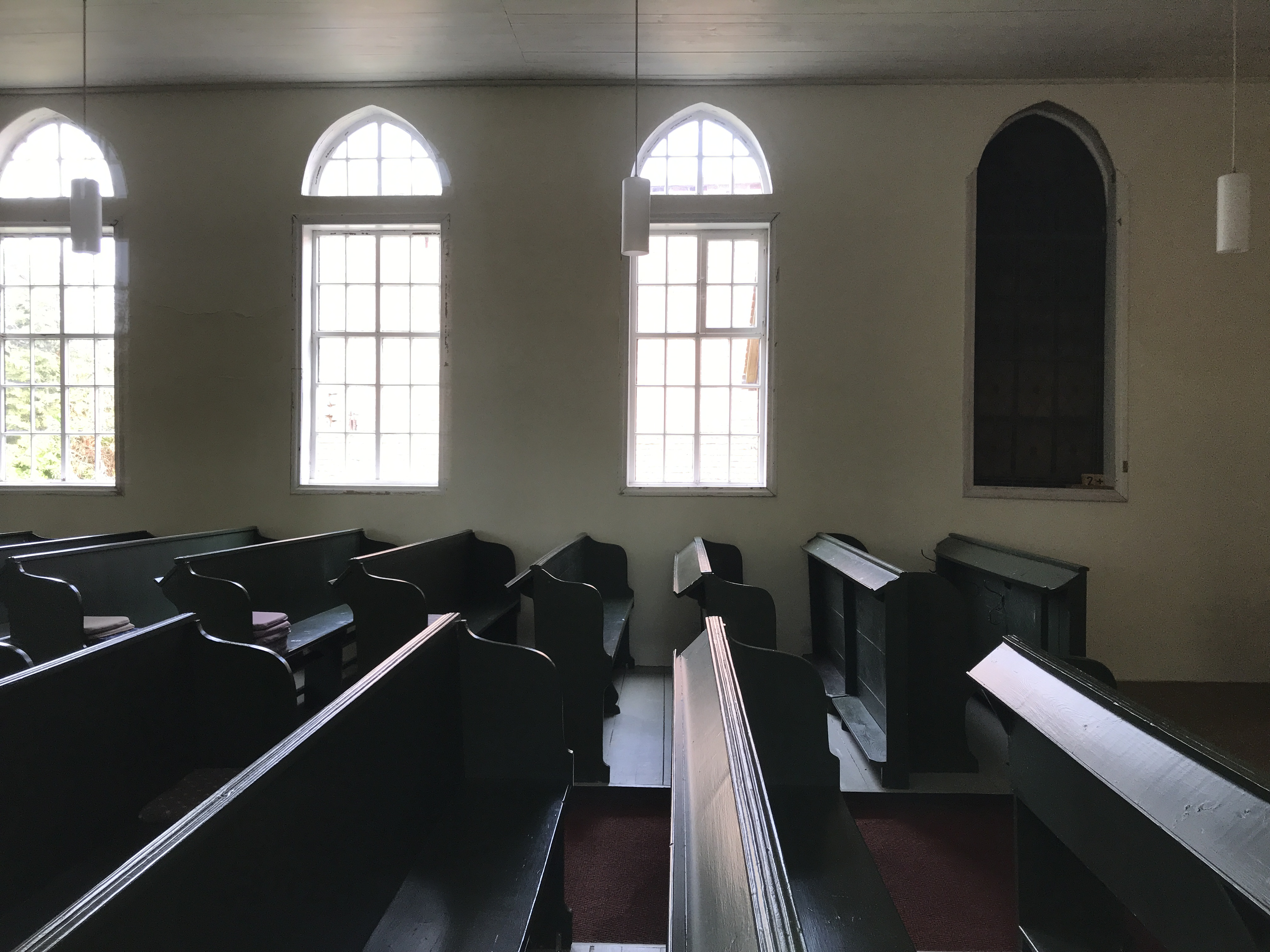 Dorfkirche Zellendorf in der Gemeinde Niedergörsdorf im Ortsteil Zellendorf im Landkreis Teltow-Fläming in Brandenburg